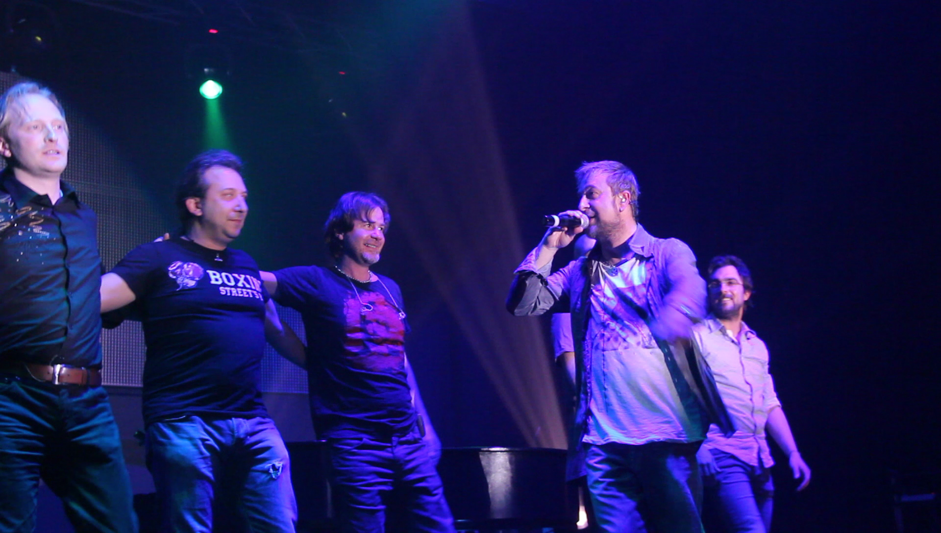 MARCO MASINI E LA SUA BAND